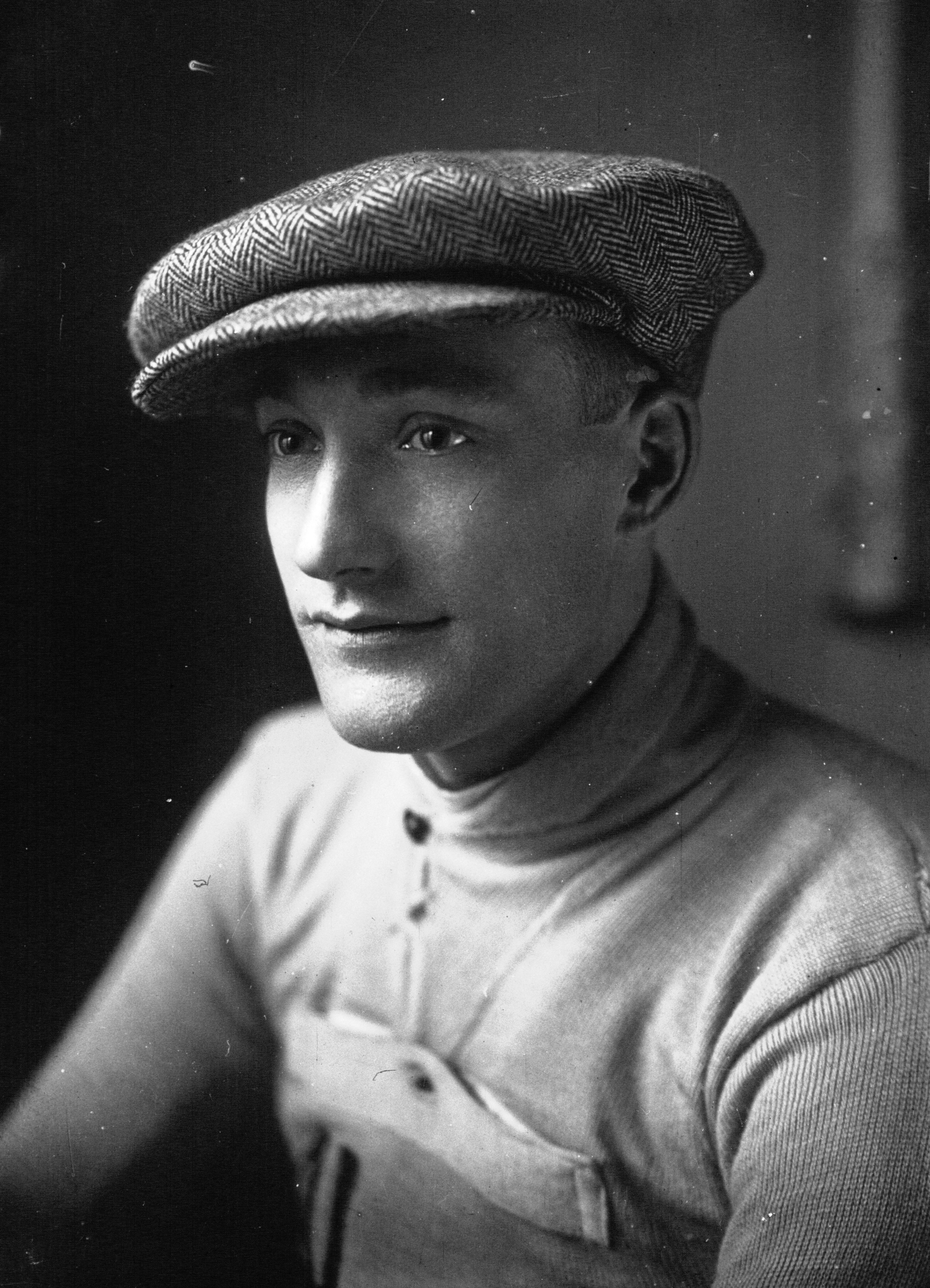 André Leducq en 1931